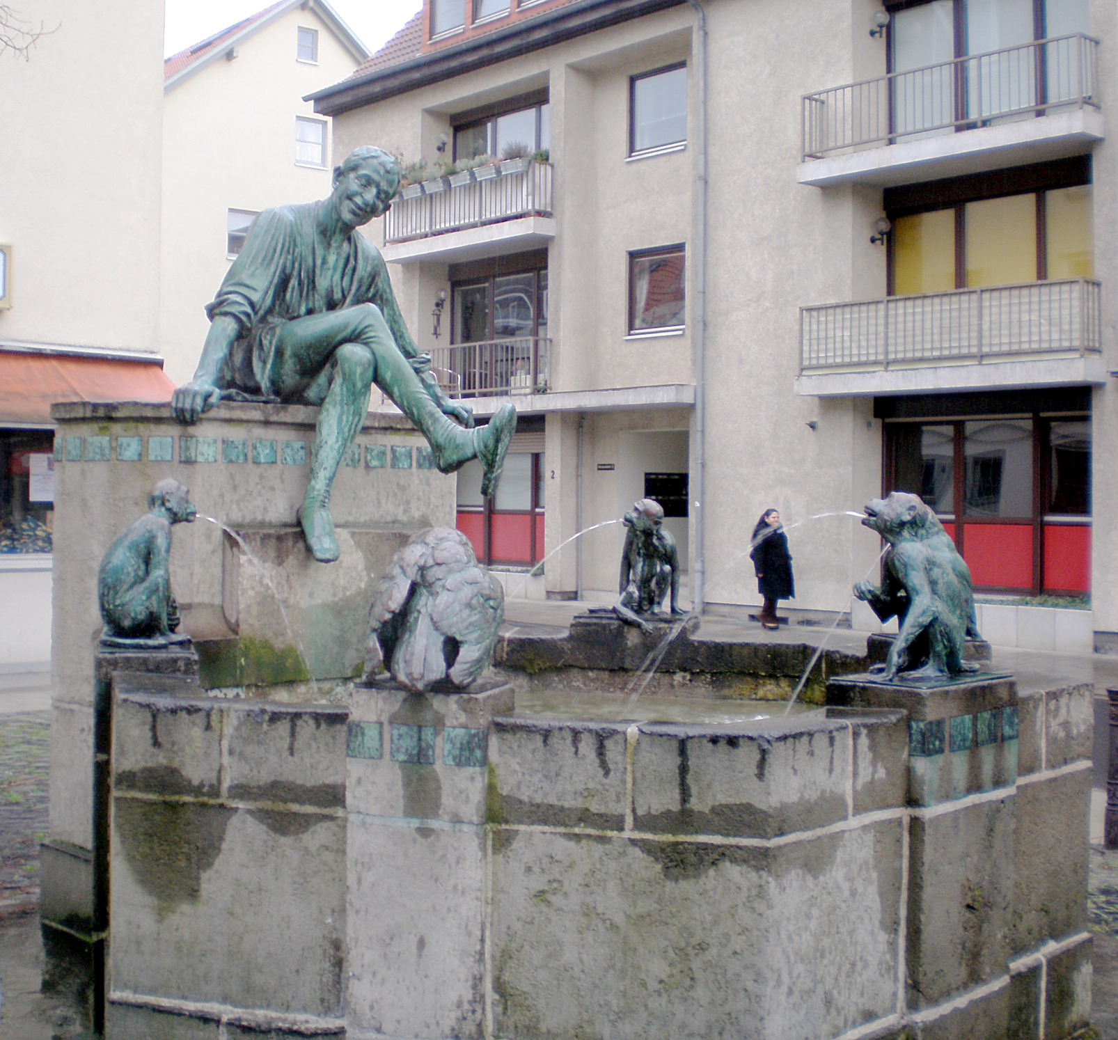 Скульптура Тиль Уленшпигель